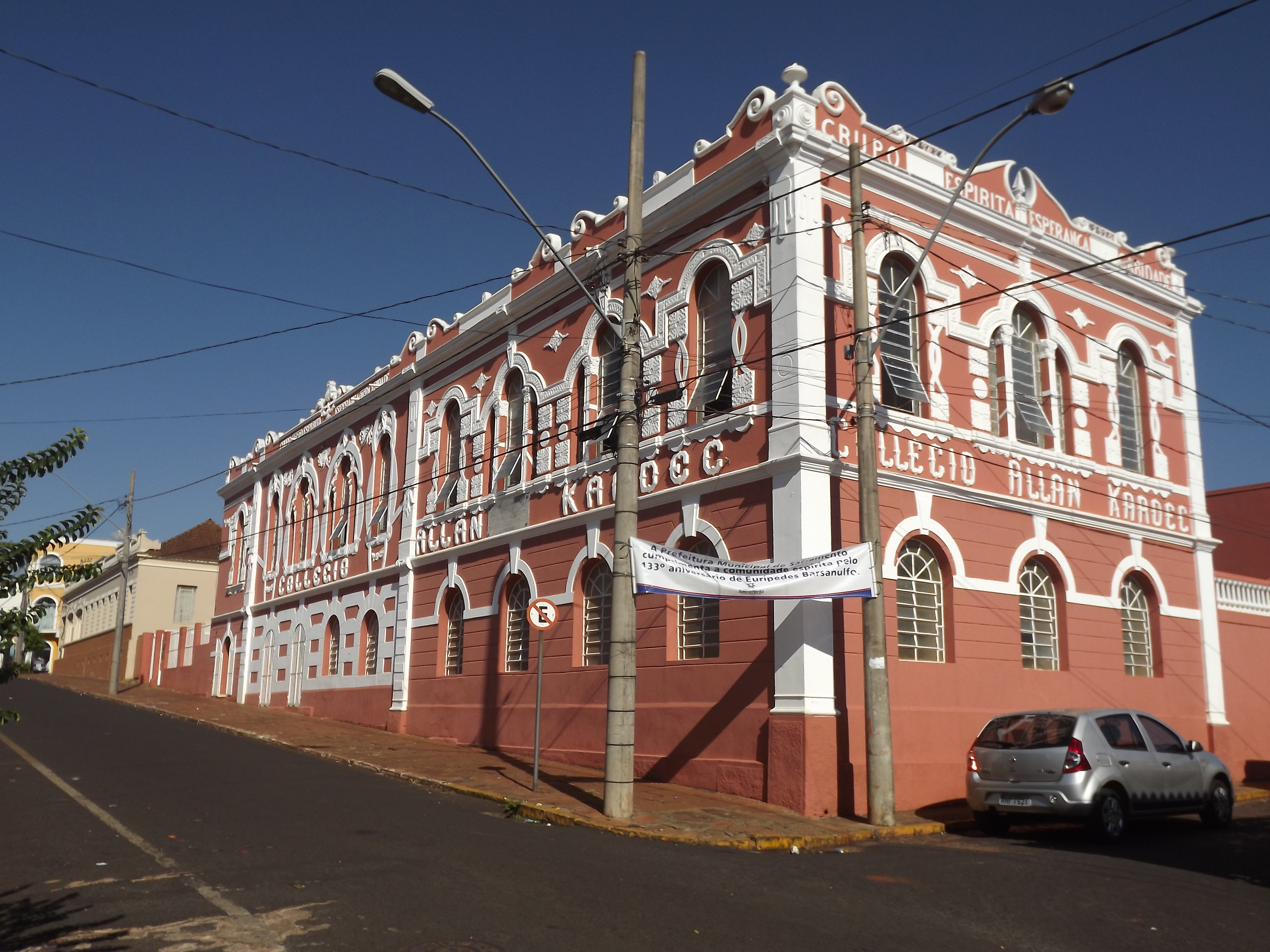 Fundo do Colégio Allan Kardec